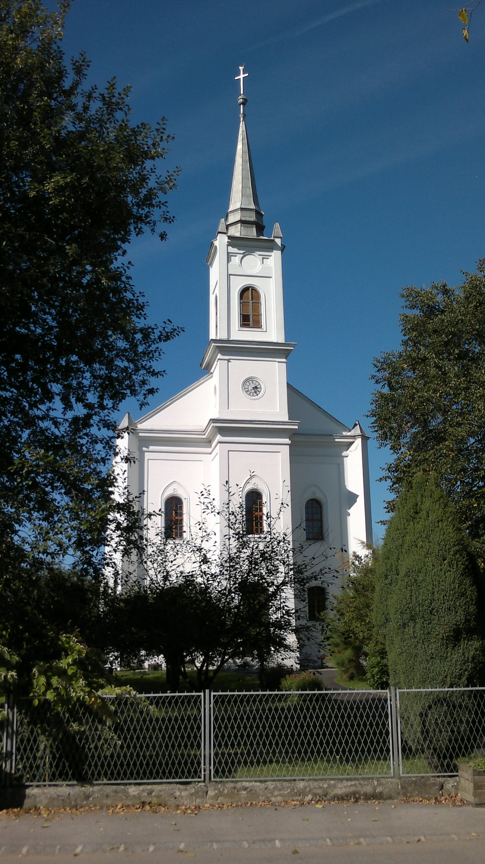 Evang. Pfarrkirche A.B., Südfassade